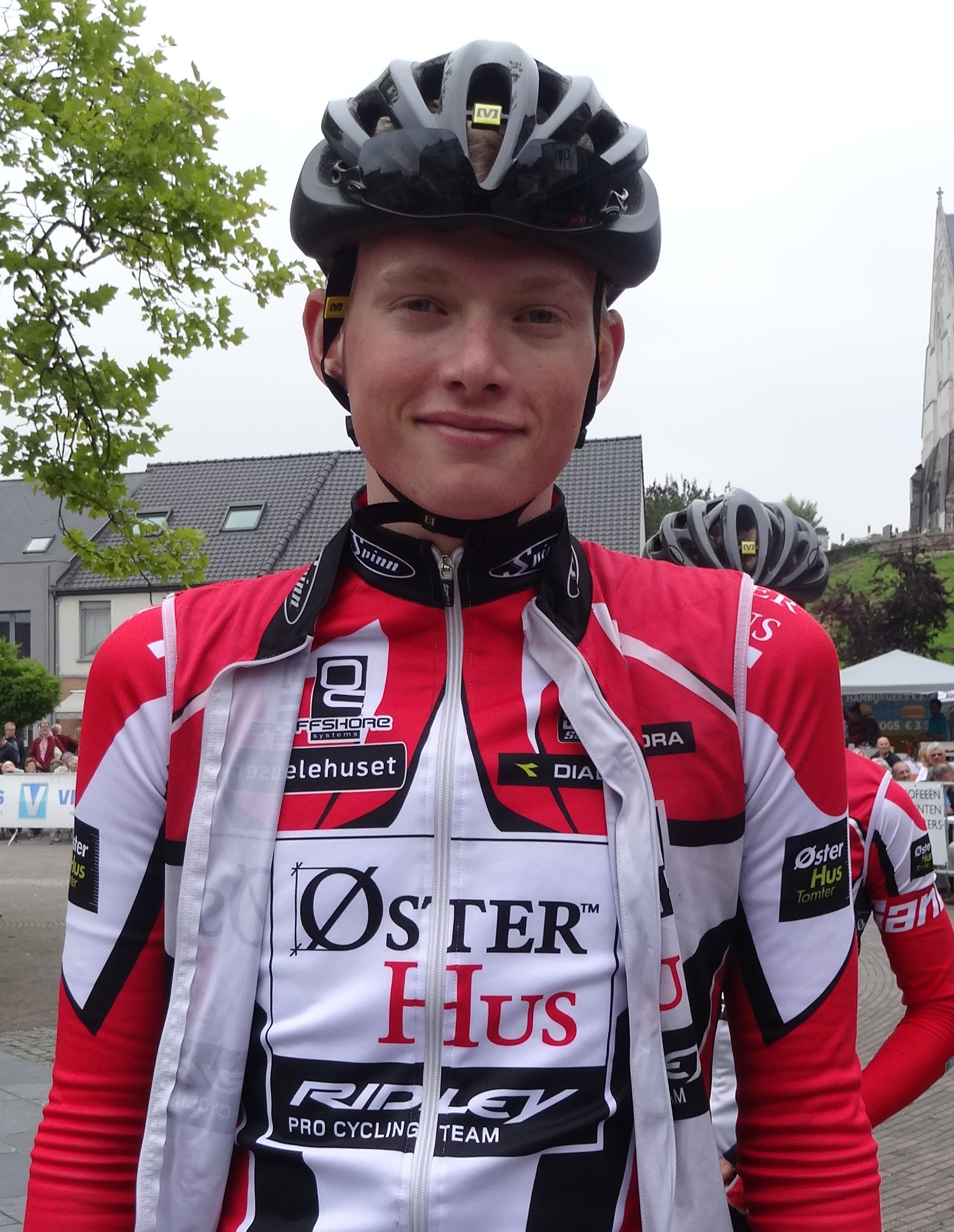 Reportage photographique réalisé le mercredi 27 août à l'occasion du départ de la Druivenkoers Overijse 2014 à Huldenberg, Belgique.